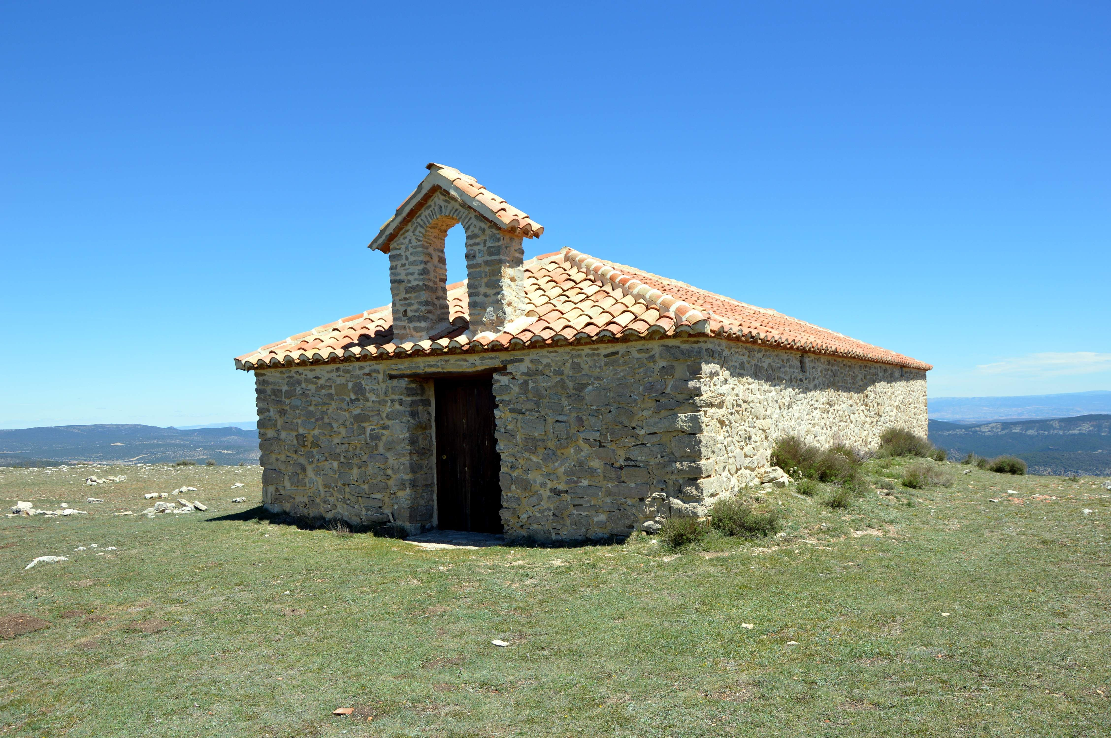 Vista general (suroccidental) de la Ermita de San Cristóbal en Jabaloyas (Teruel), 2017.